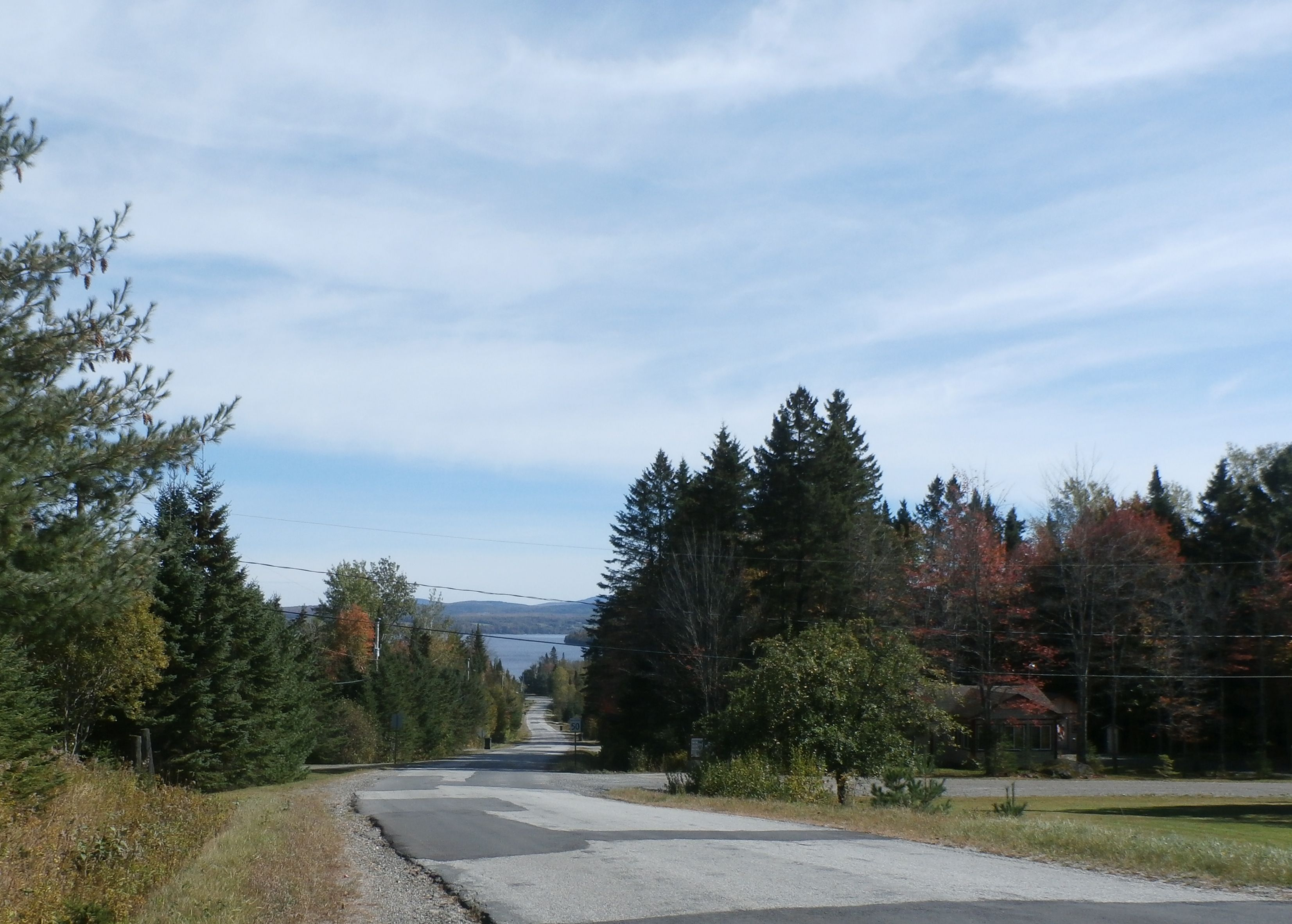 Chemin de la Baie-Victoria entre Marston et le Lac Mégantic.